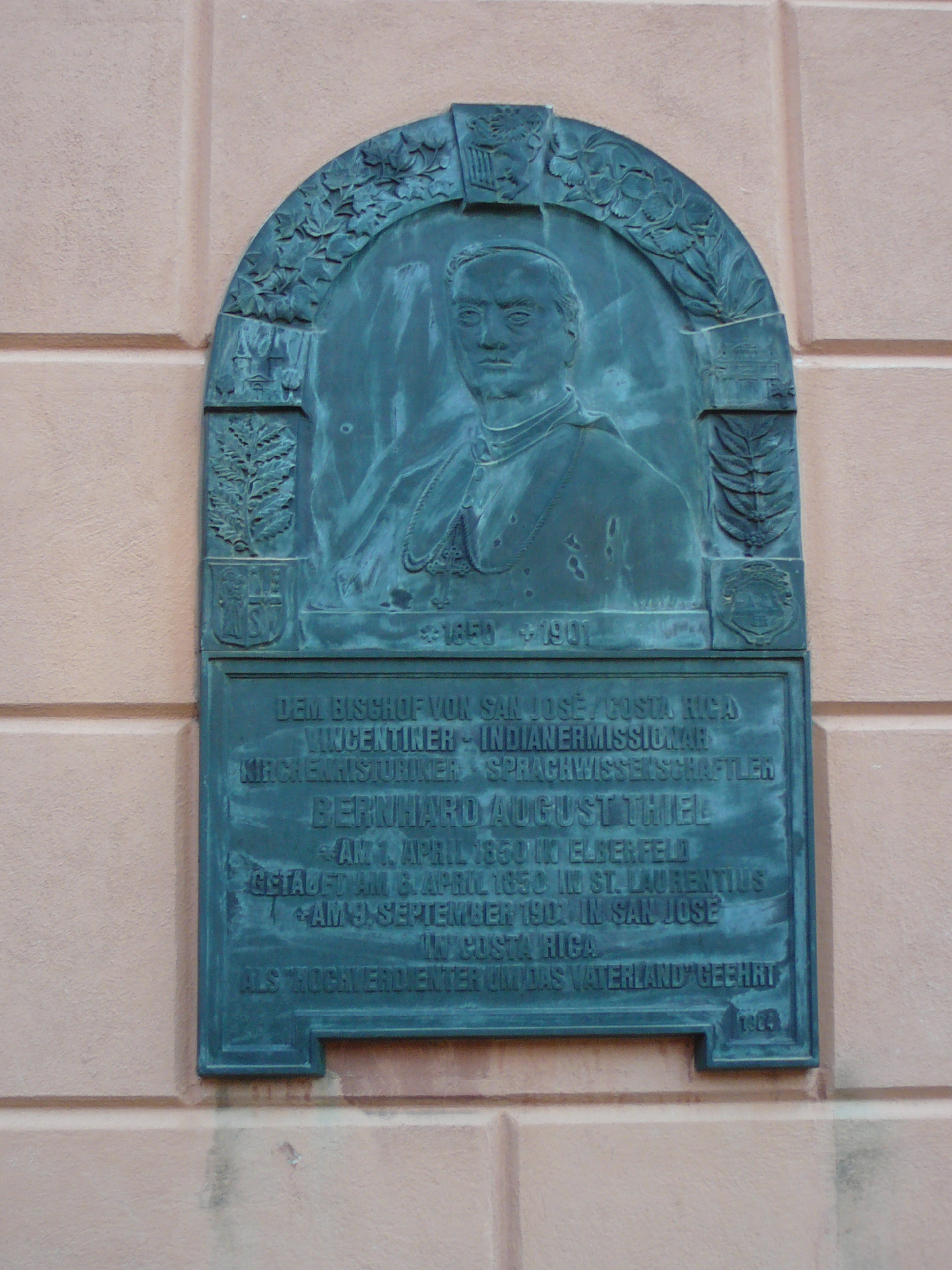 Relief am St. Laurentius, Wuppertal